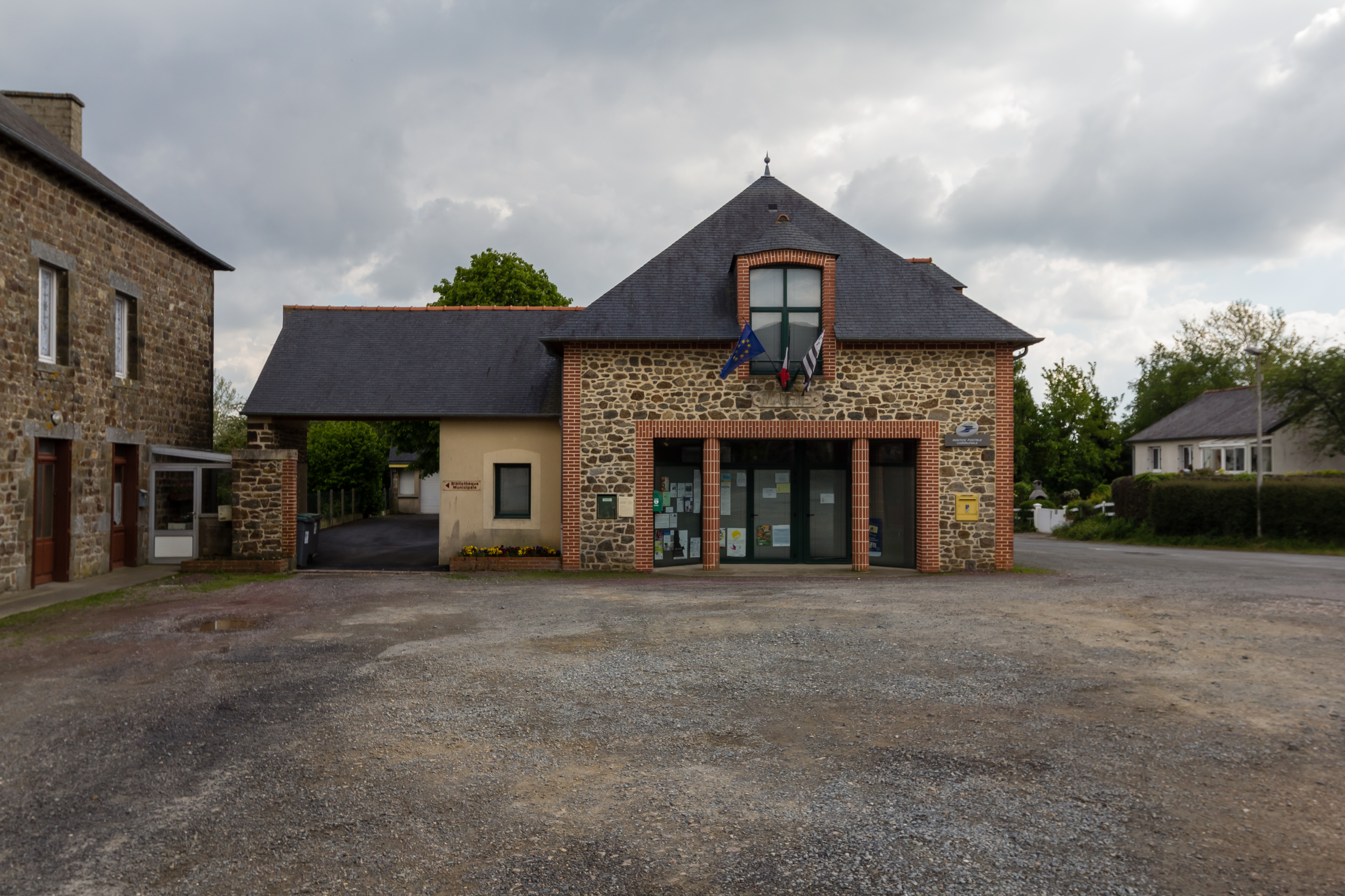 Mairie de Miniac-sous-Bécherel (France).